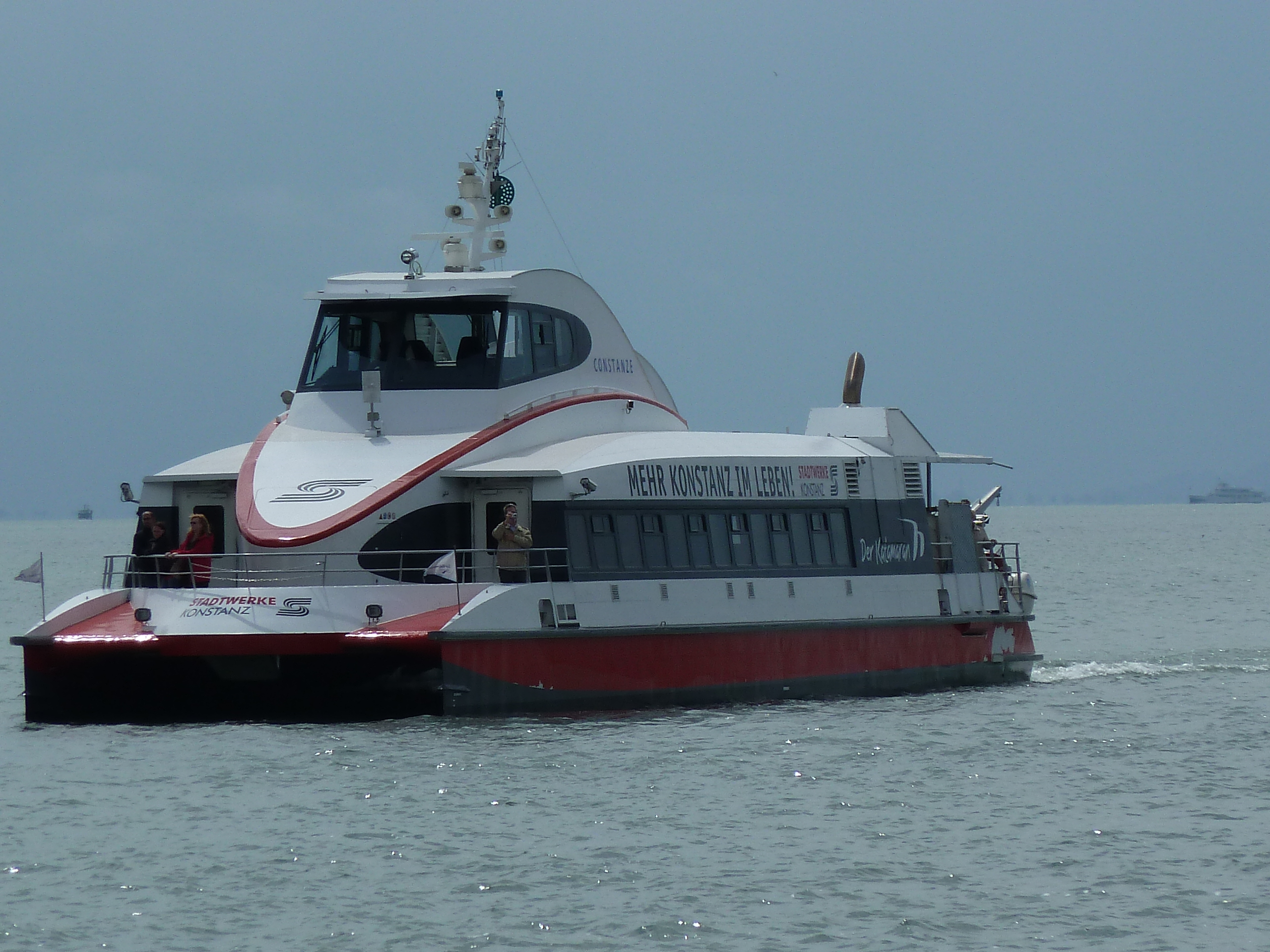 Constanze vor der Hafeneinfahrt von Friedrichshafen